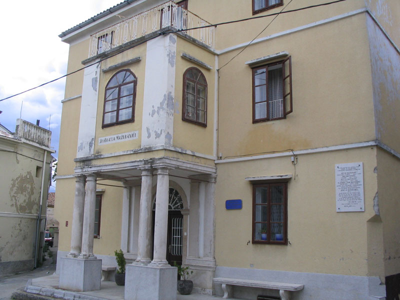 Novi Vinodolski, Rodna kuća braće Mažuranić (Antun, Ivan, Matija, Vladimir Fran)